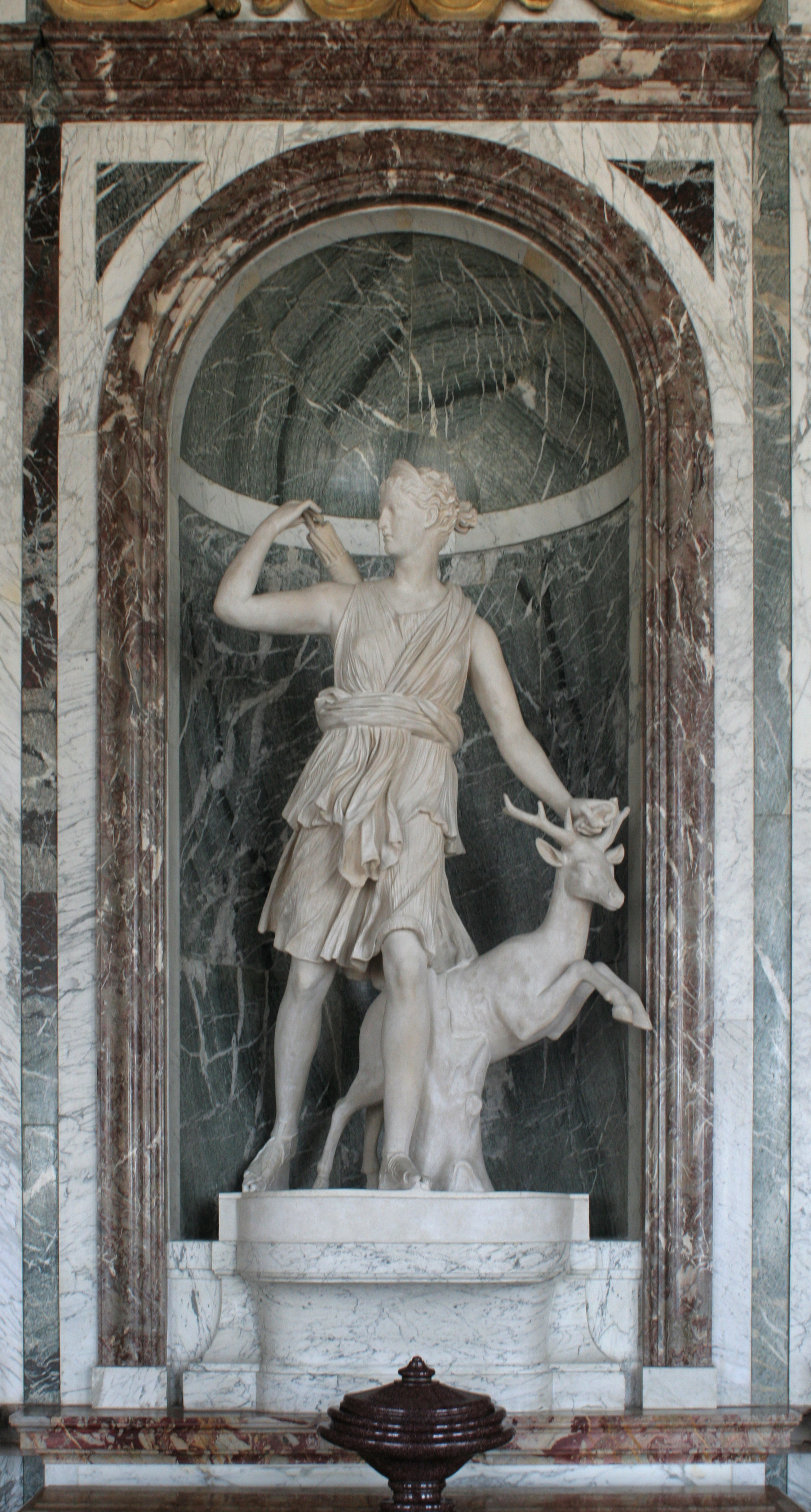 Château de Versailles, galerie des glaces, Diane Chasseresse dite Diane à la biche ou Diane de Versailles : moulage marbre reconstitué mis en place dans une des niches de la Galerie des Glaces le 7 juillet 1997, don de l'EPA du Louvre 1997.Numéro d'inventaire : MV9007 Height: 2 m (78.7 in) dimensions QS:P2048,2.00U11573